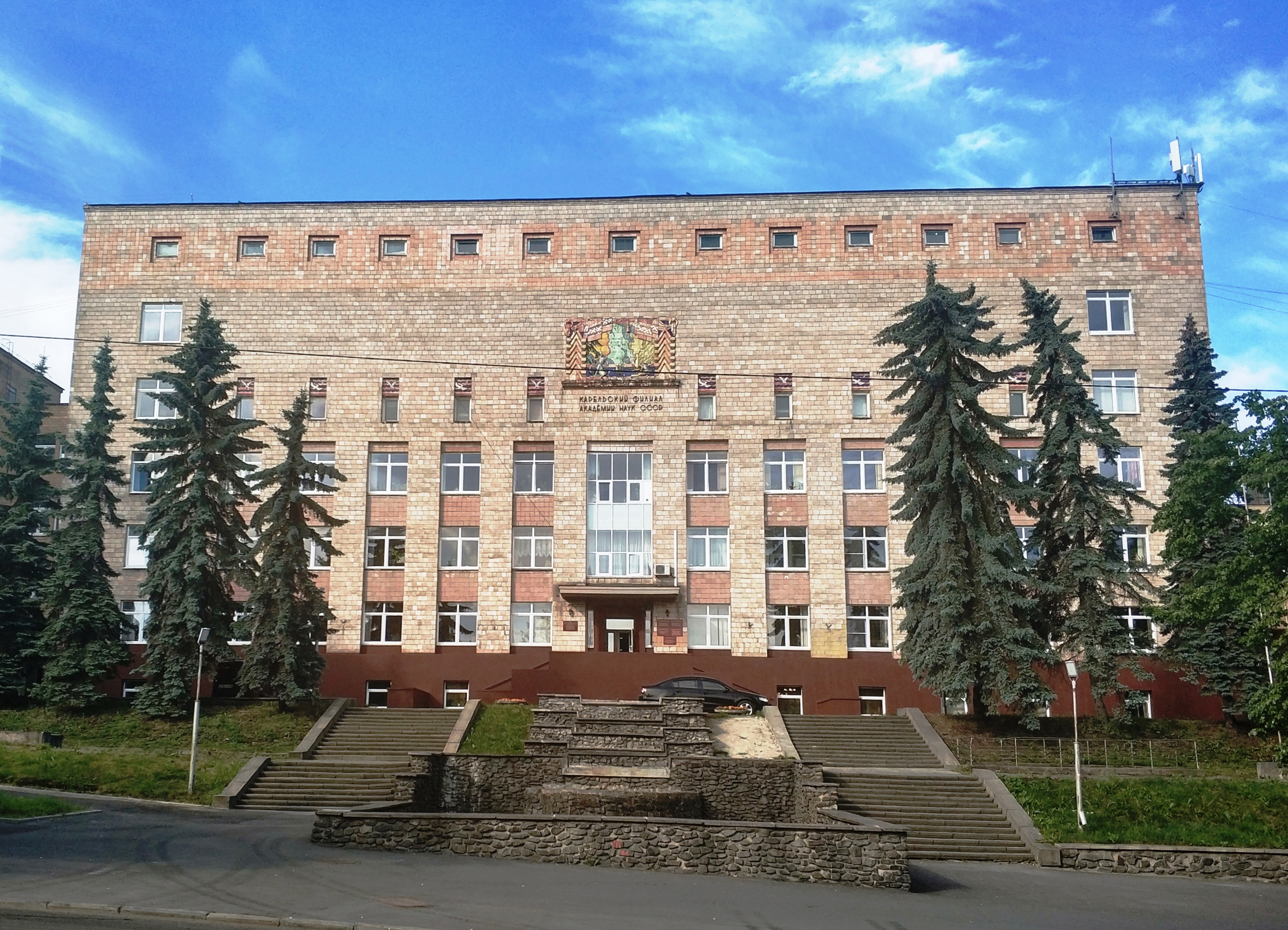 Здание Карельского Научного центра РАН в Петрозаводске на ул. Пушкинской